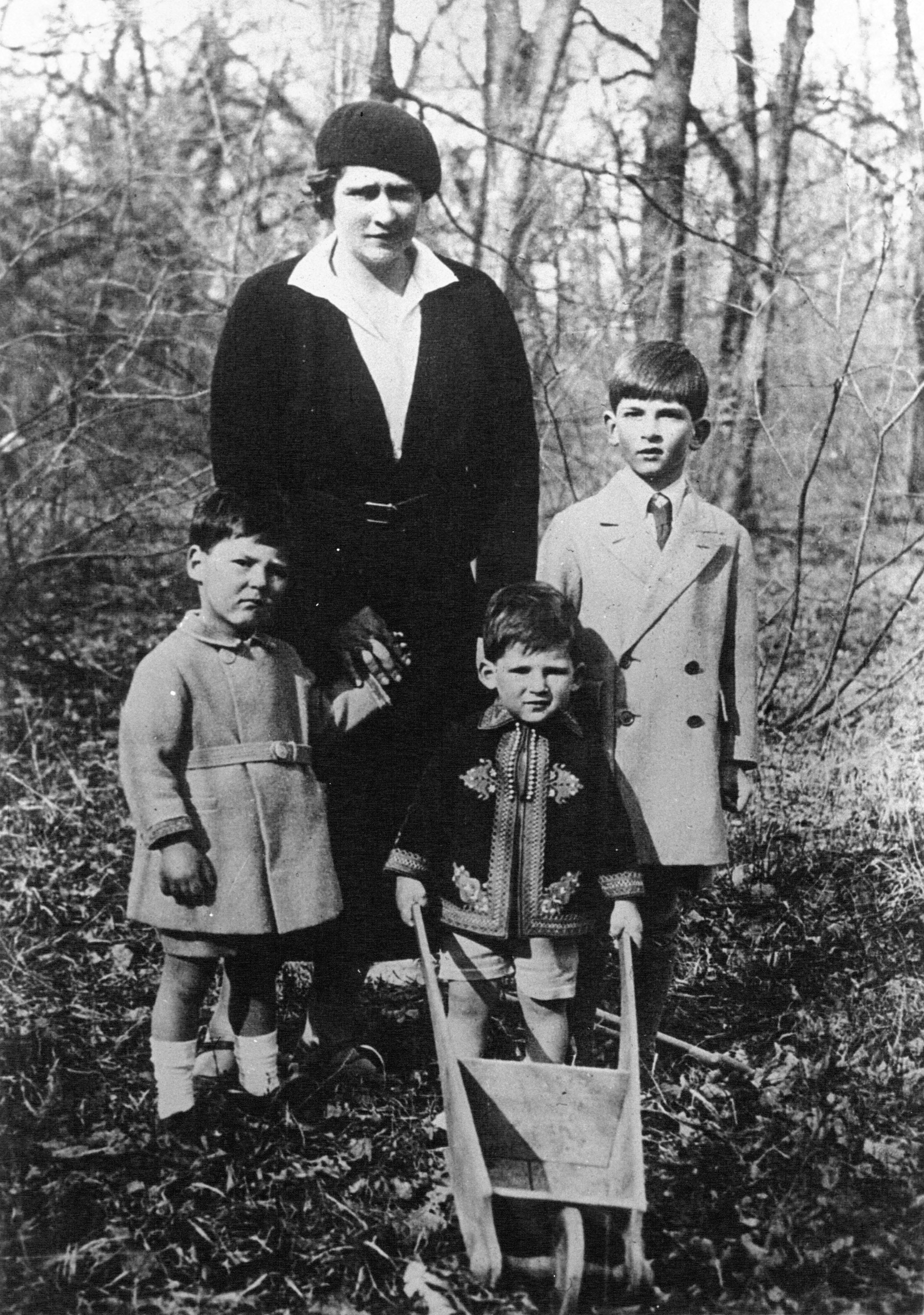 Sa majesté la reine Marie de Serbie avec ses enfants, de gauche à droite : les princes Pierre, Tomislav et André